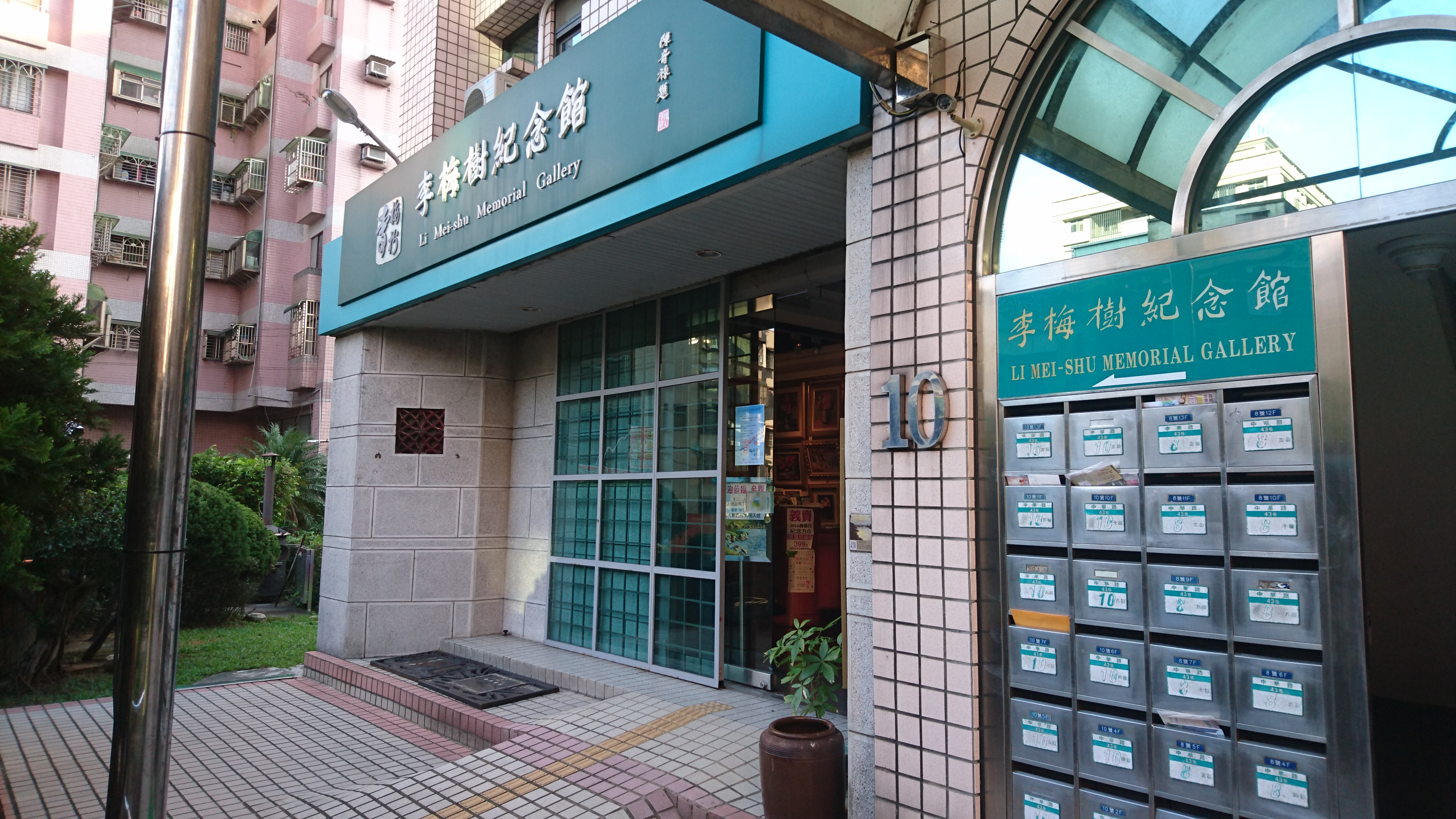 李梅樹紀念館門面